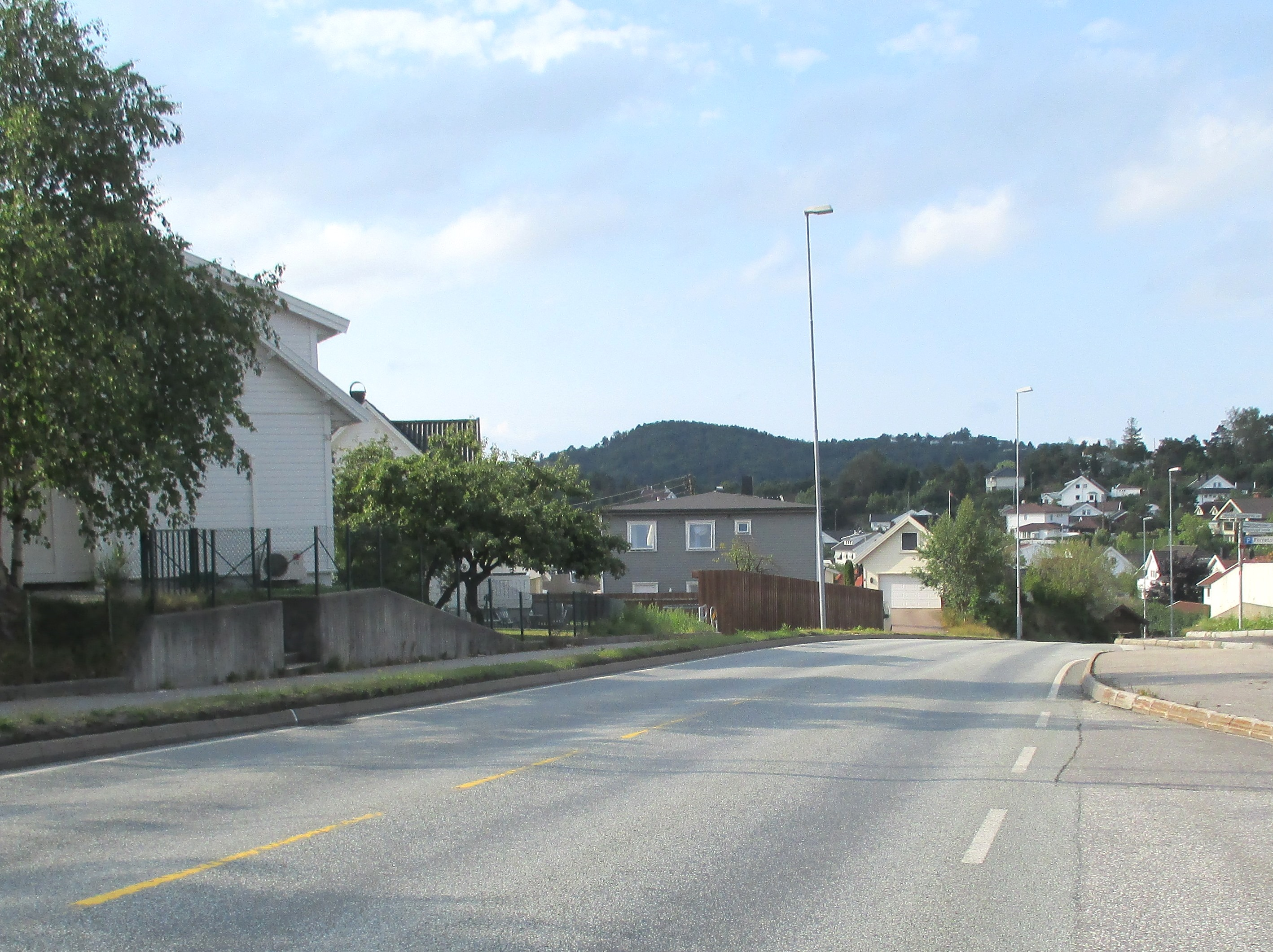 Primær fylkesvei 456 i Vågsbygd i Kristiansand